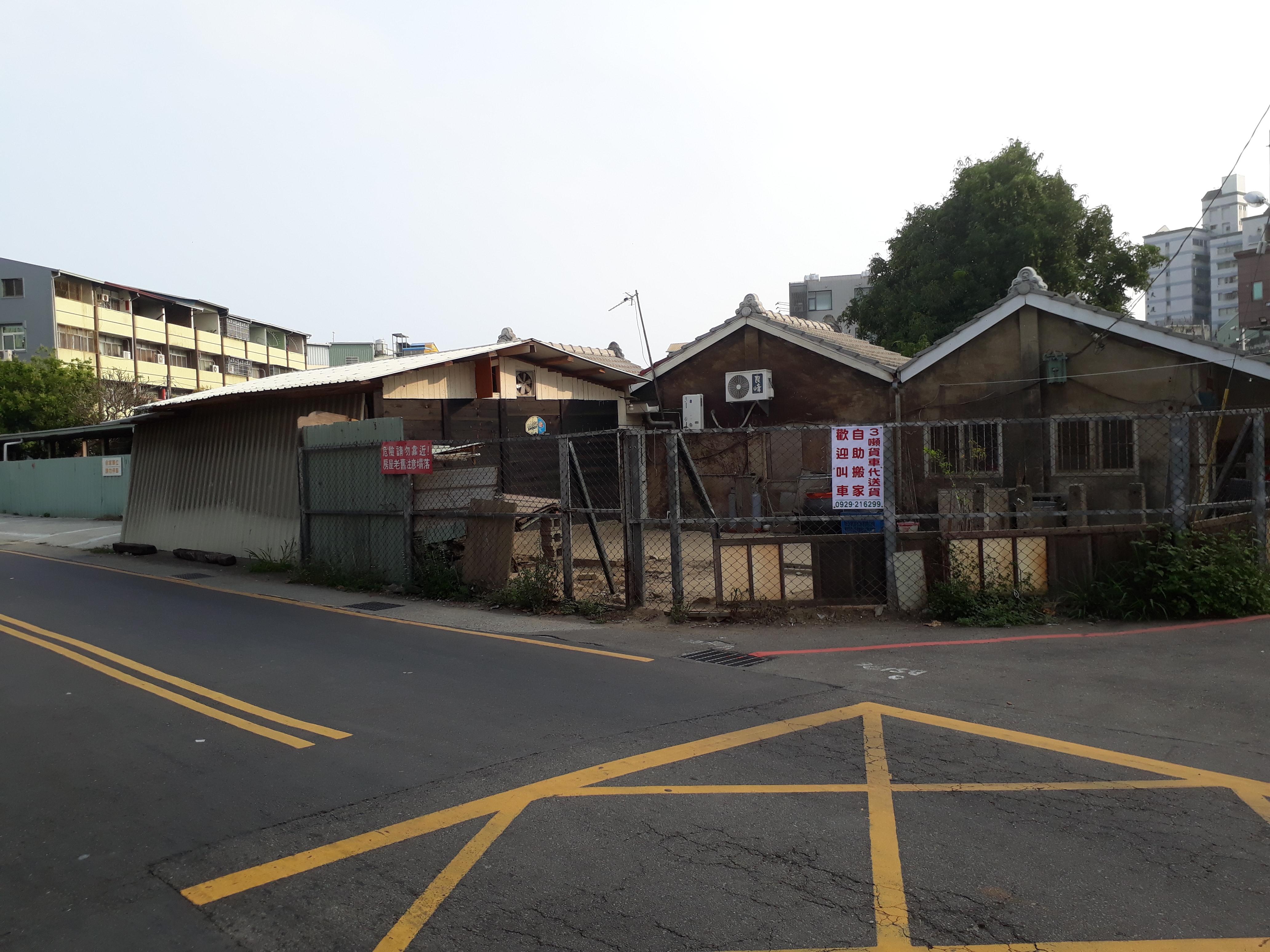 台灣糖業鐵路中南線的太平車站現況